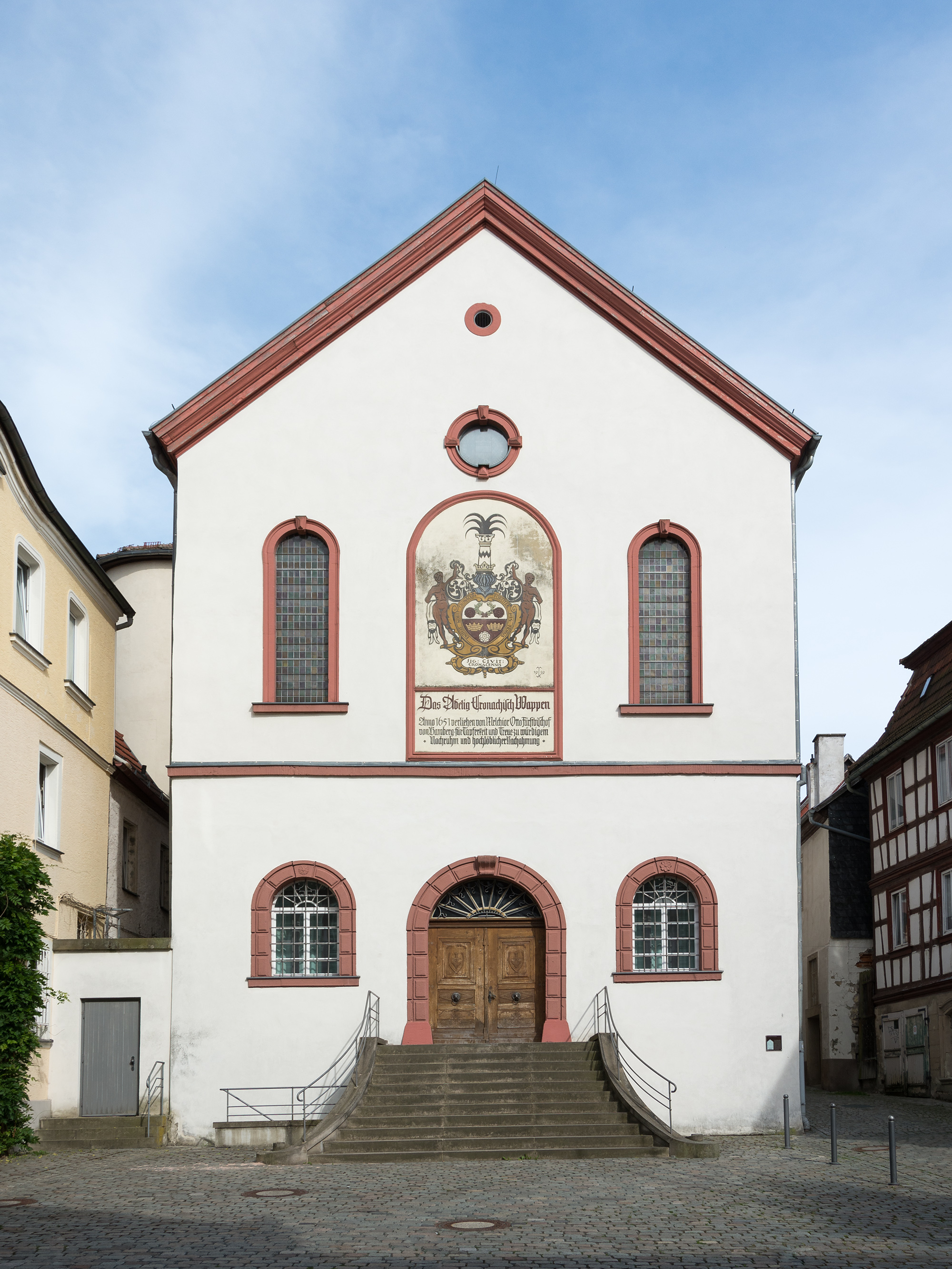 Westseite des historischen Rathauses in Kronach mit dem Eingang zur ehemaligen Markthalle. Am Obergeschoss eine Darstellung des Stadtwappens, das der Stadt Kronach 1651 vom Bamberger Fürstbischof Melchior Otto Voit von Salzburg verliehen wurde.